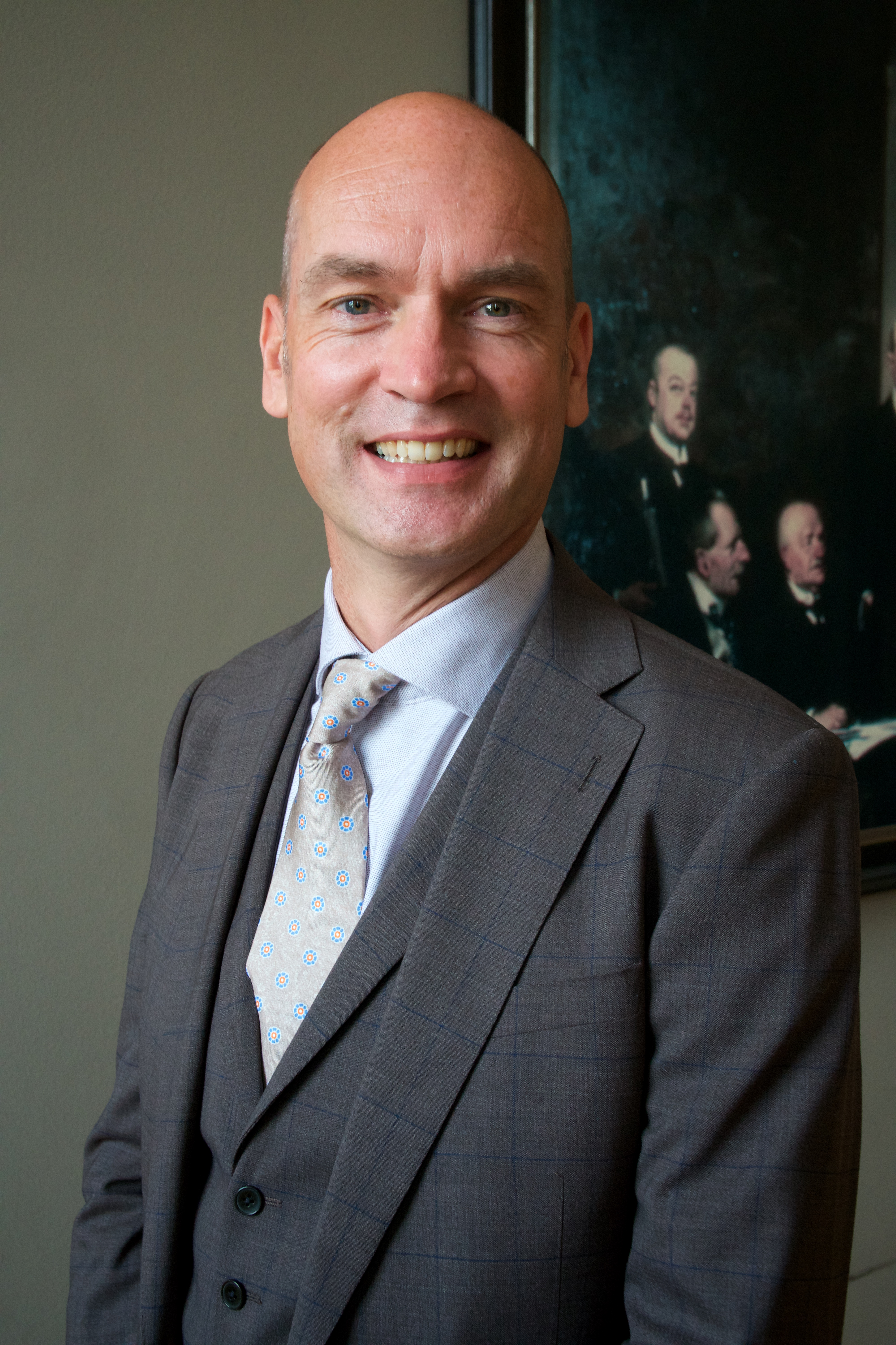 De Nederlandse politicus Gert-Jan Segers (parlementariër voor de ChristenUnie) tijdens Prinsjesdag 2018, Den Haag